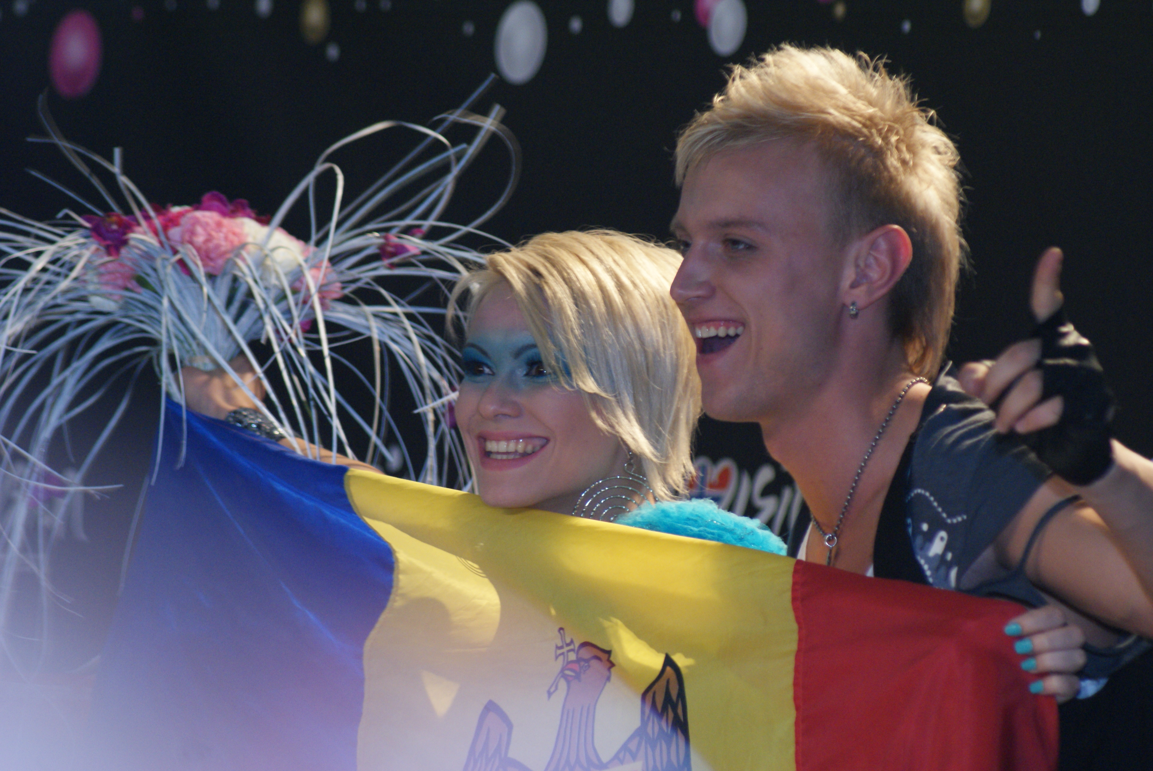 Olia Tira & Sergei Yalovitsky (Sunstroke Project)